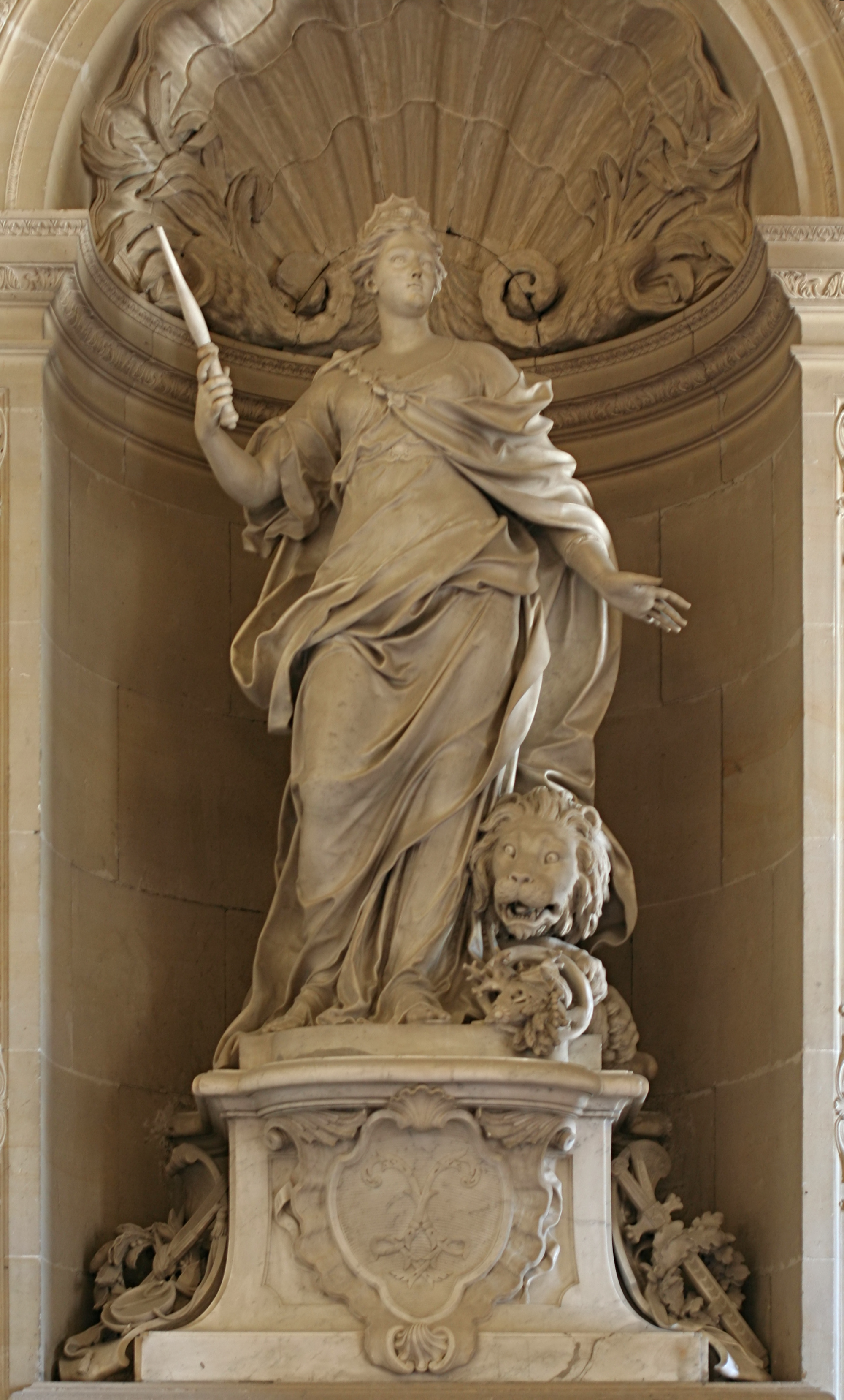 Château de Versailles, vestibule de la chapelle, Magnanimité, statue de Jacques Bousseau./MV7956./ Désignation: groupe./ Titre: La Magnanimité royale./ Domaine: Sculptures./ Sculpteur: Jacques Bousseau, 1681-1740./ Date: 1726-1730./ Période: XVIIIe siècle./ Matière : marbre, 302 x 150 x 100 cm./ Description: Figure allégorique de la Magnanimité, un sceptre dans la main droite, l'autre ouverte, à ses pieds le lion symbole de la force et de la grandeur d'âme, les pattes posées sur une corne d'abondance./ Emplacement actuel: Versailles, Musée national des châteaux de Versailles et Trianon, Aile Nord, chapelle, salon haut.